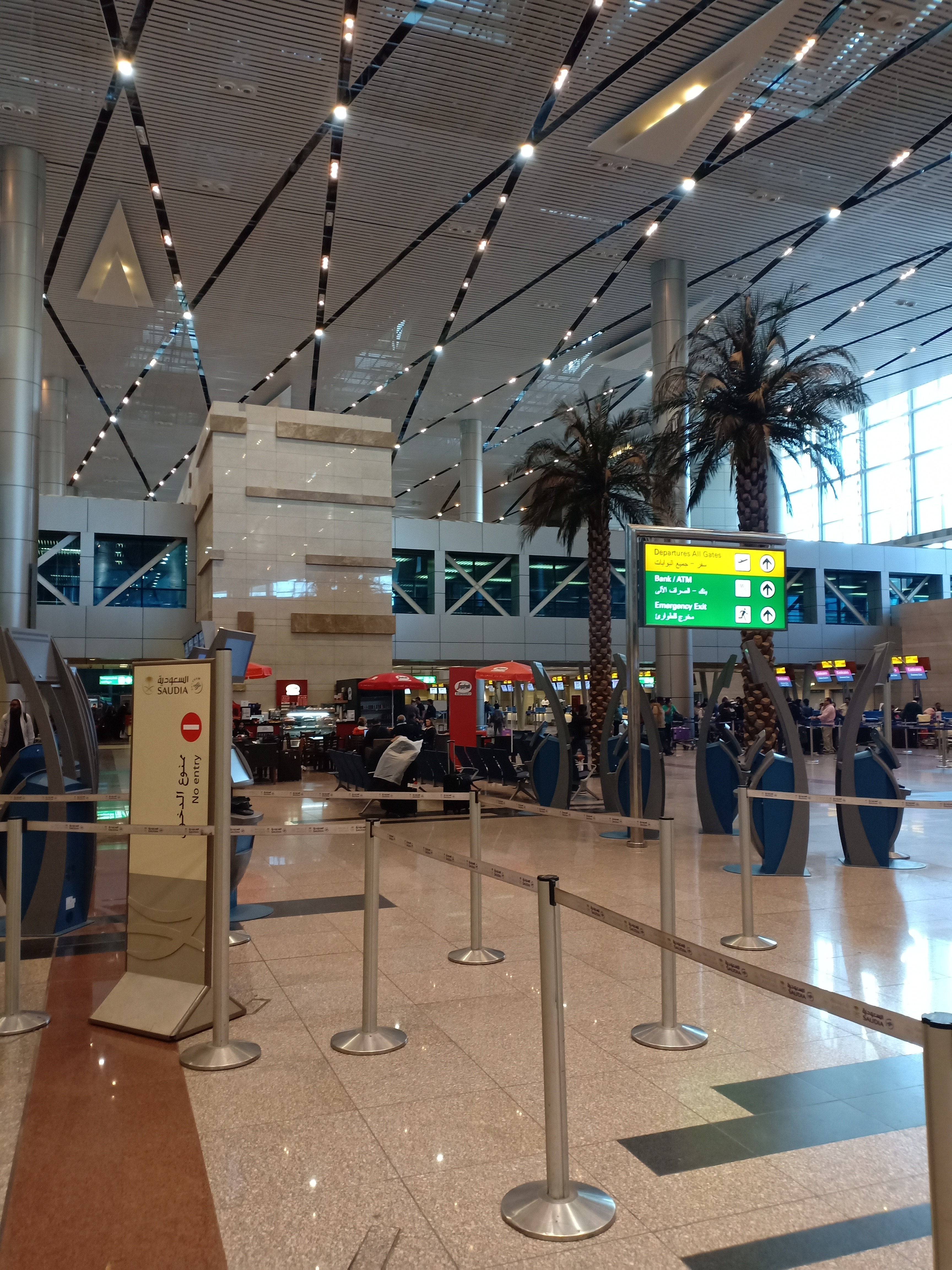 صوره لمبنى الركاب الجديد صاله 2